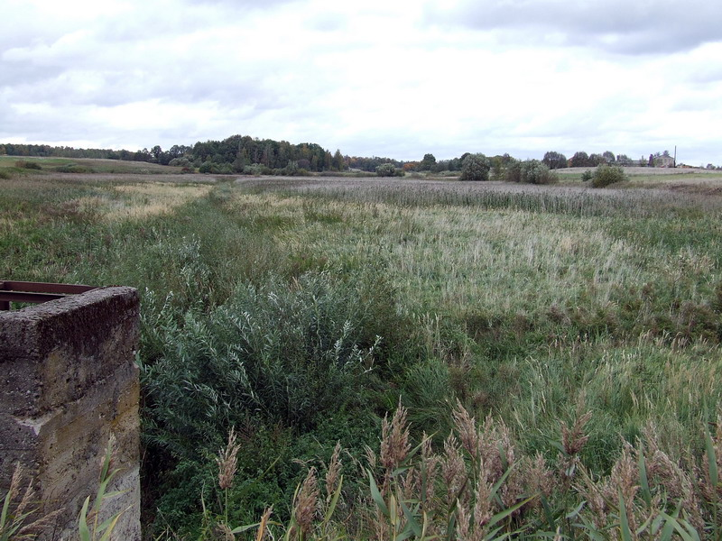 Blinstrubiškiai I pond, Raseiniai district, Lithuania.